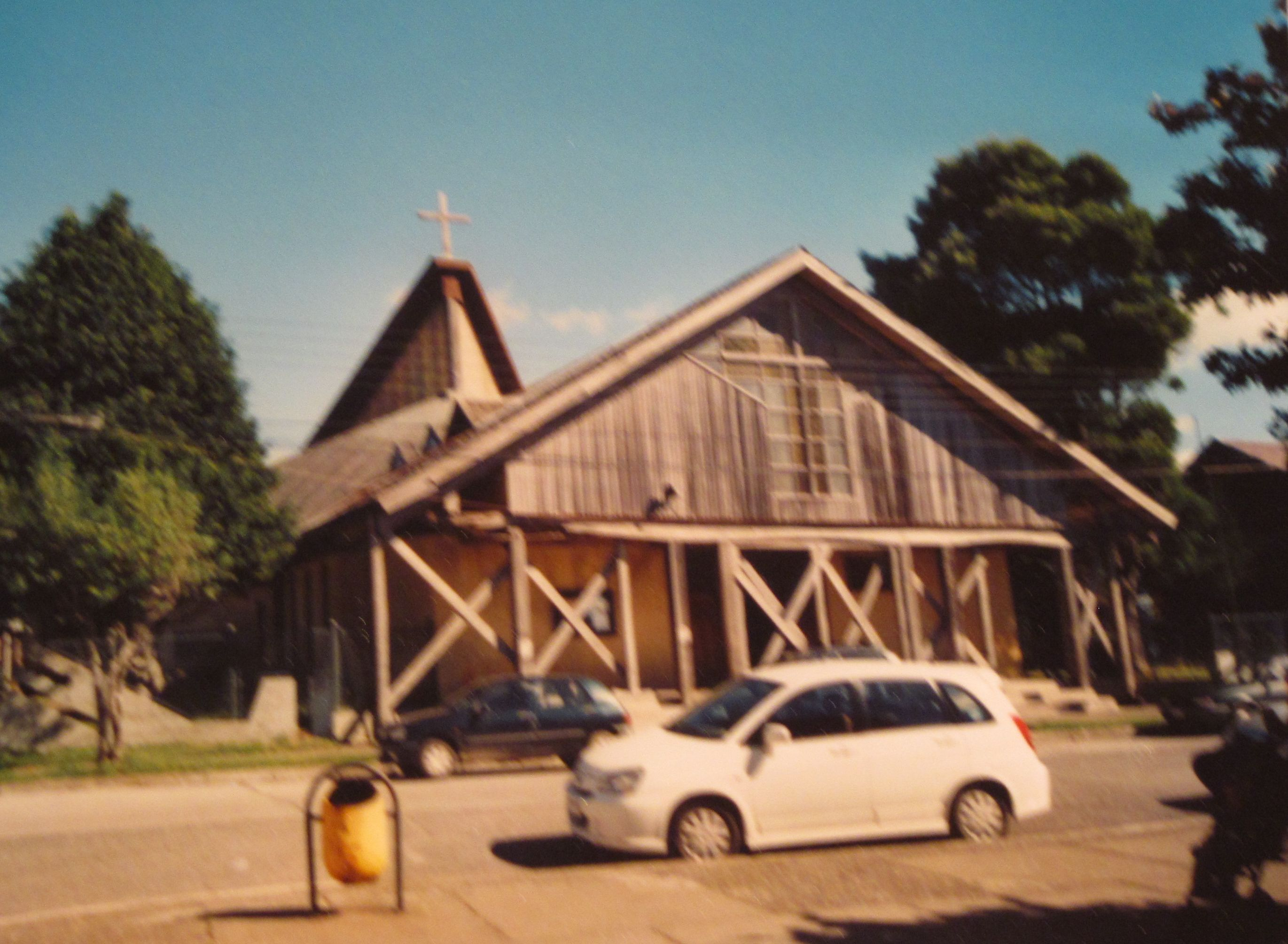 Catedral de Ancud, Isla de Chiloé, Chile